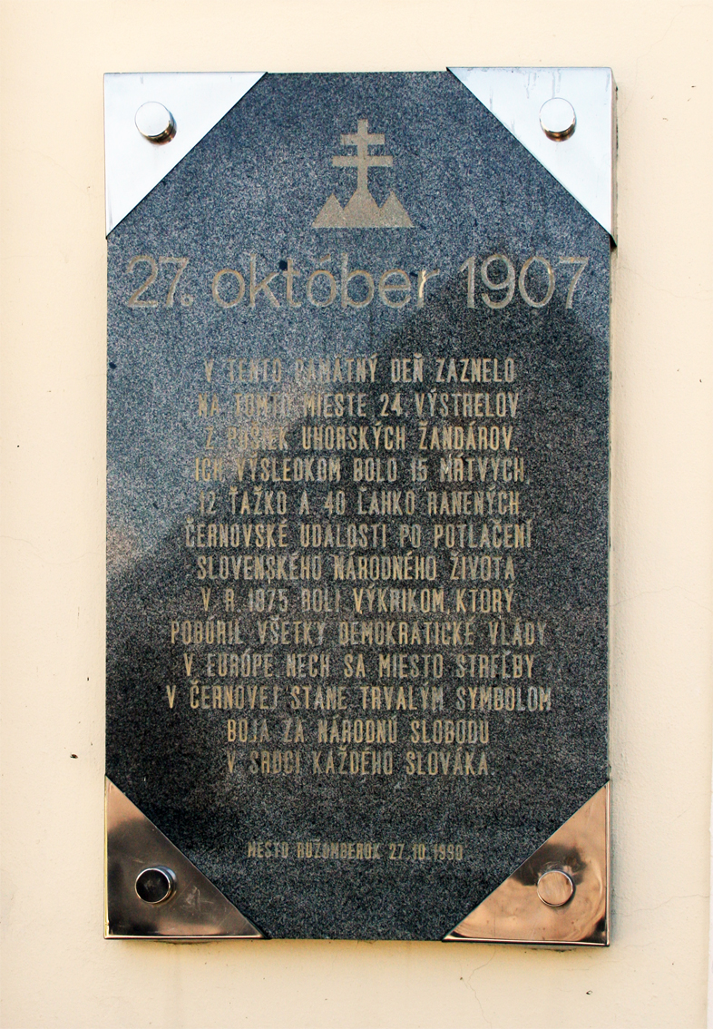 Pamätná tabuľa na 27. október 1907